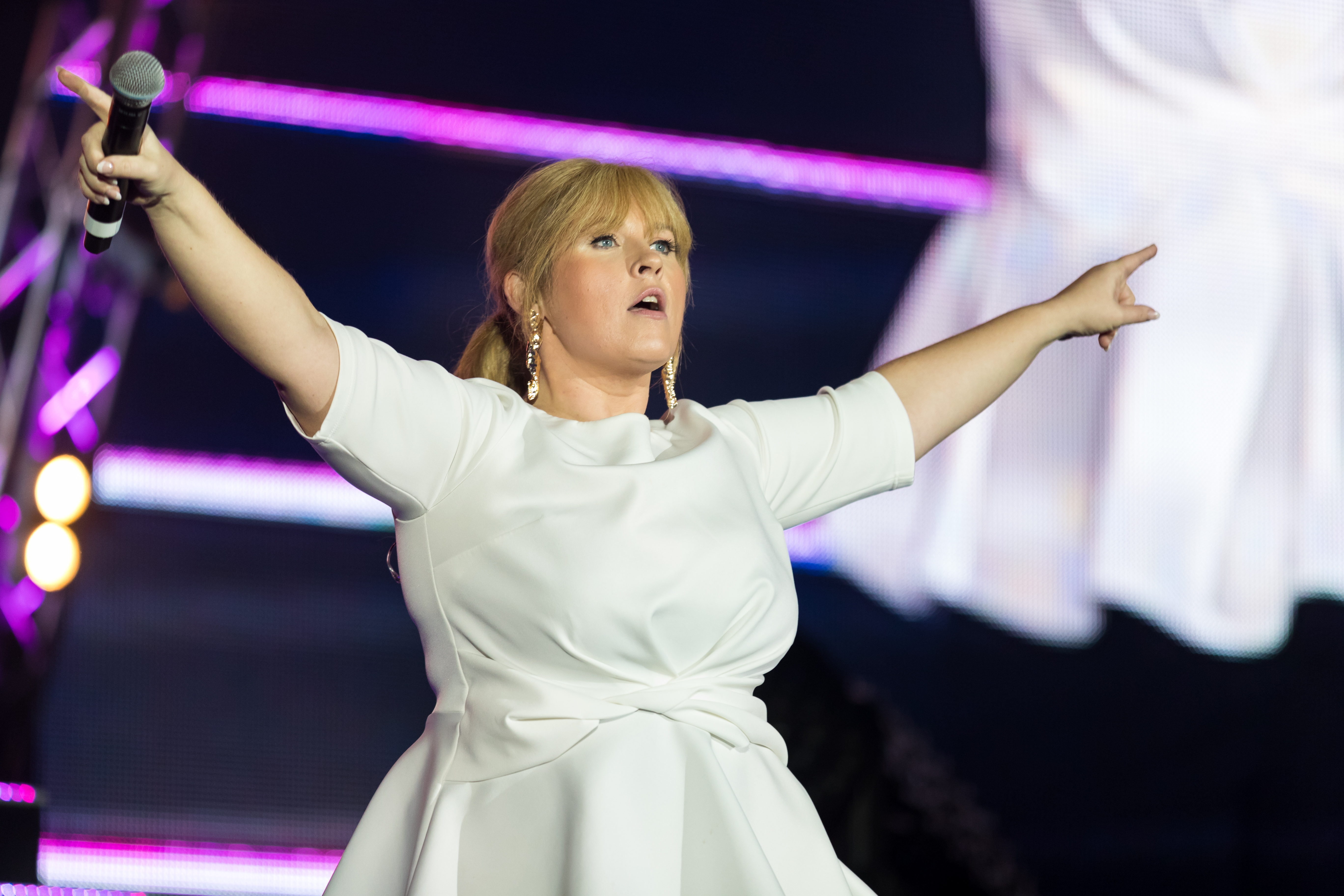 Maite Kelly during Die Schlagernacht des Jahres at Hanns-Martin-Schleyer-Halle, Stuttgart, Baden-Württemberg, Germany on 2017-10-14, Photo: Sven Mandel